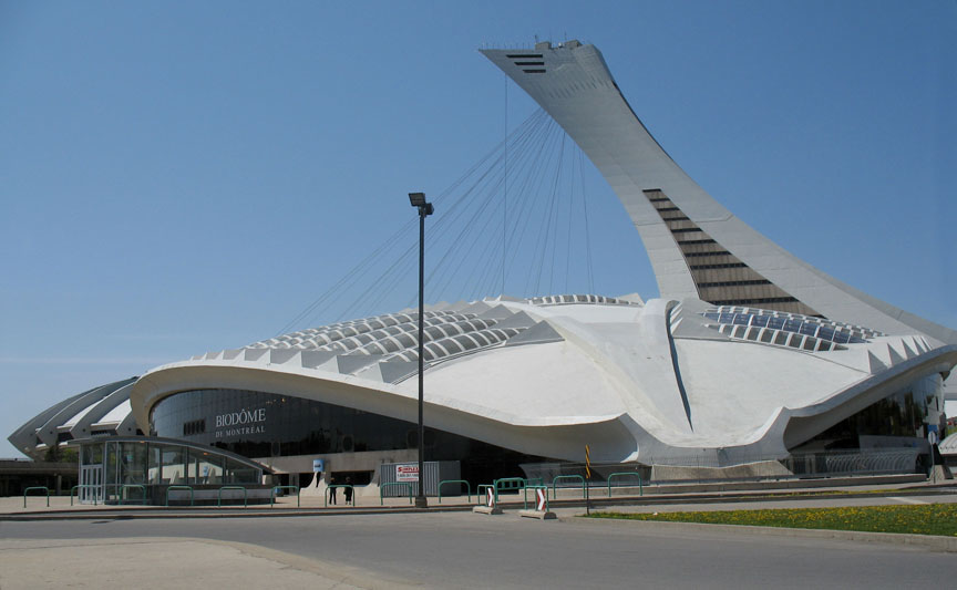 Biodôme de Montréal, Québec, Canada. À l'arrière, la tour du stade olympique.